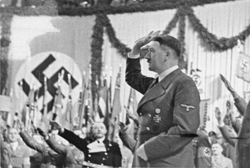 Berlin, Hitler im Sportpalast Der Führer sprach zum ganzen deutschen Volk Am Abend des historischen 30. Januar hielt der Führer im Berliner Sportpalast vor Tausenden Volksgenossen und zahlreichen Soldaten eine grosse Rede an das ganze deutsche Volk. Sie wurde zu einer schneidenden Abrechnung mit den plutokratischen Kriegstreibern und zu einem begeisterten Bekenntnis zur Grösse und Macht des nationalsozialistischen Deutschlands. - Unser Bild zeigt den Führer nach dem Betreten des Rednerpultes, wo ihm orkanartiger Jubel entgegenbrauste, der ihm zunächst minutenlang das Sprechen unmöglich machte. Scherl Bilderdienst, Berlin 30.1.42 [Adolf Hitler] Abgebildete Personen: Hitler, Adolf: Reichskanzler, Deutschland